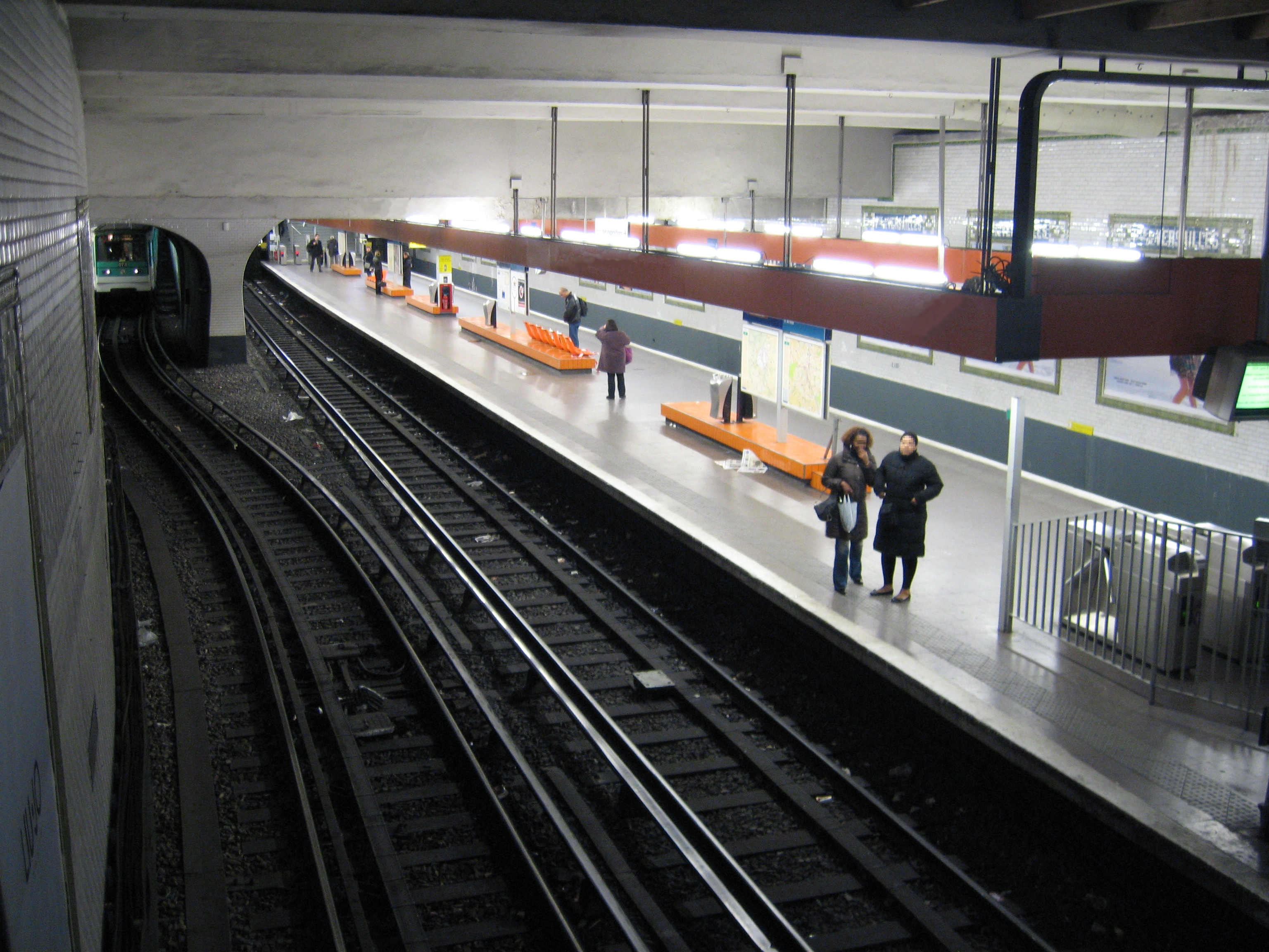 Station Porte de Versailles, ligne 12 du métro de Paris, vue depuis le nord du quai central à 2 voies direction Mairie d'Issy (sud). On peut voir la voie du sens opposé à gauche.